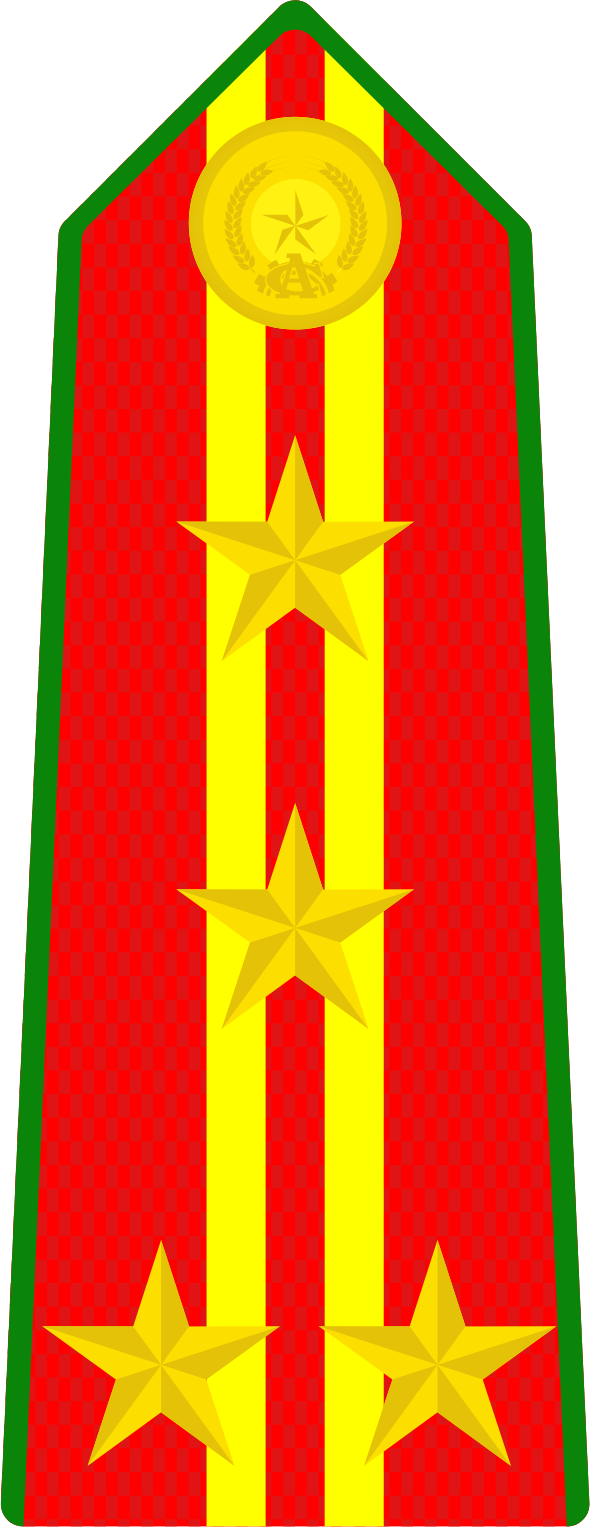 Cấp hiệu Đại tá Công an